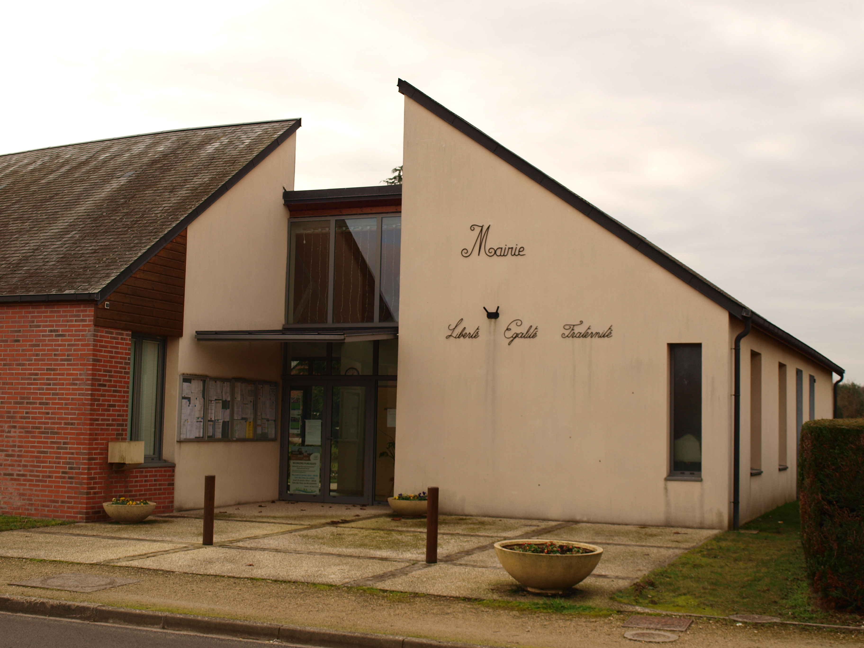 Nesploy (Loiret, France)